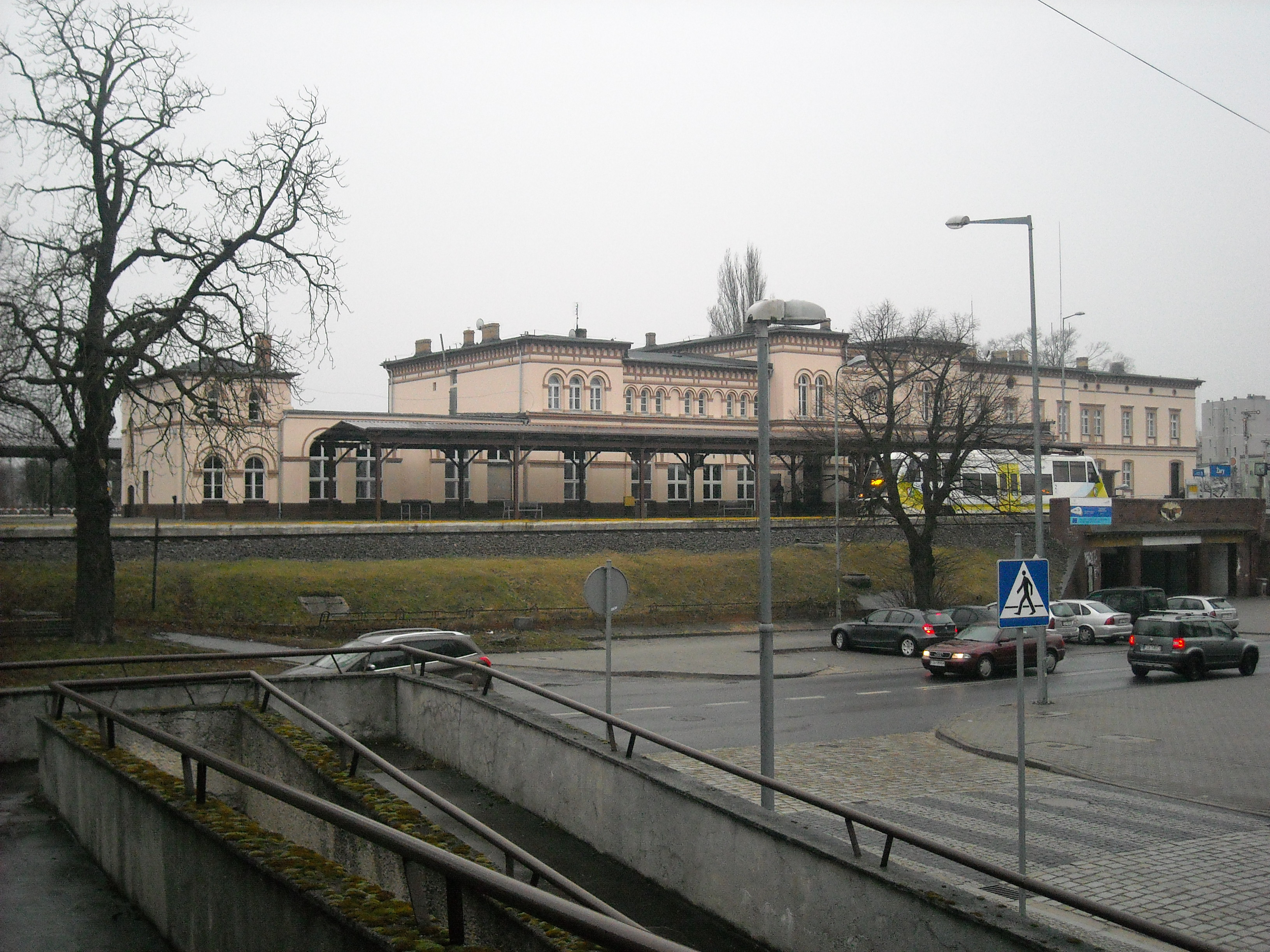 Dworzec kolejowy Żary